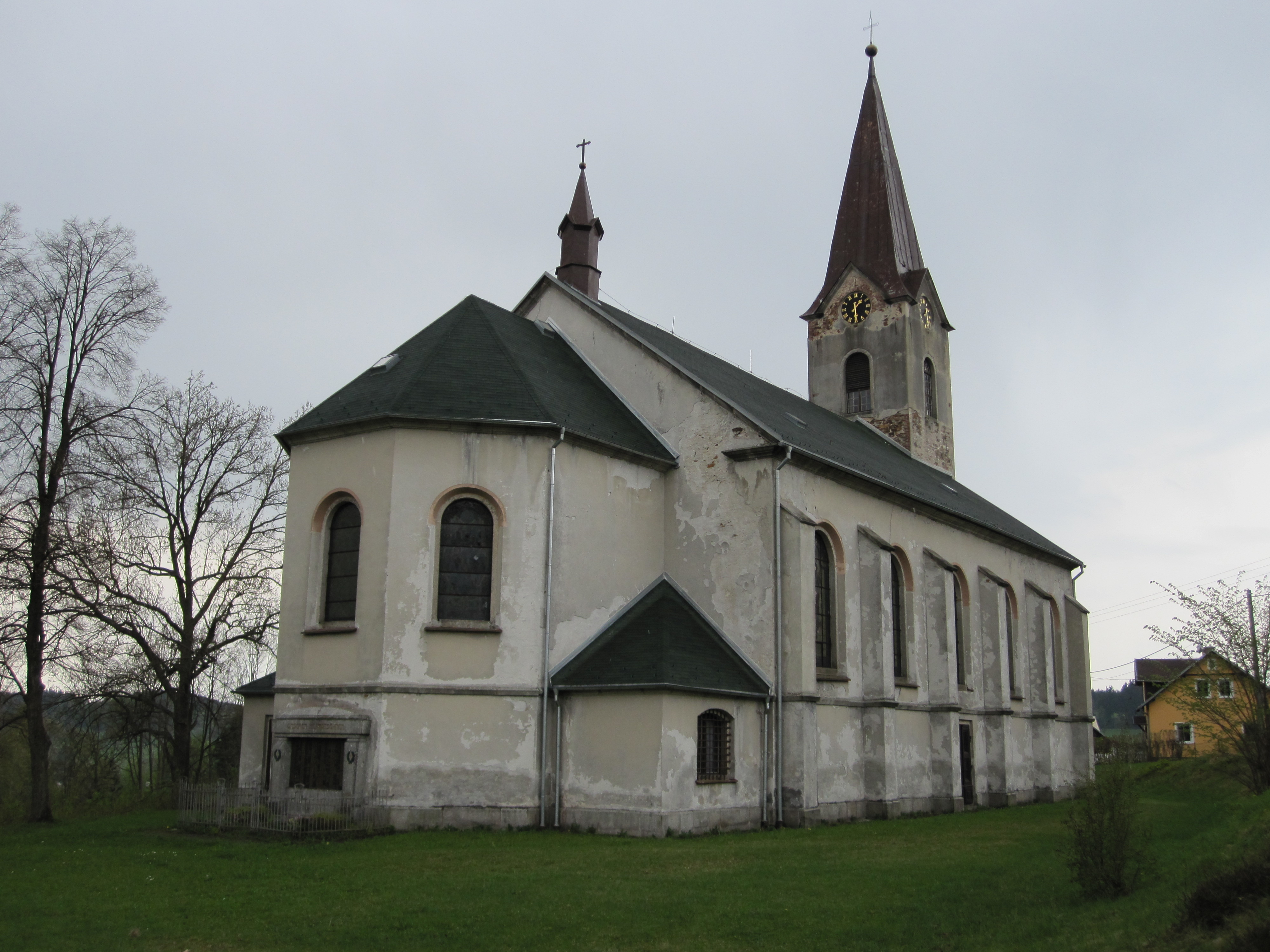 Kirche in Bublava (Schwaderbach)